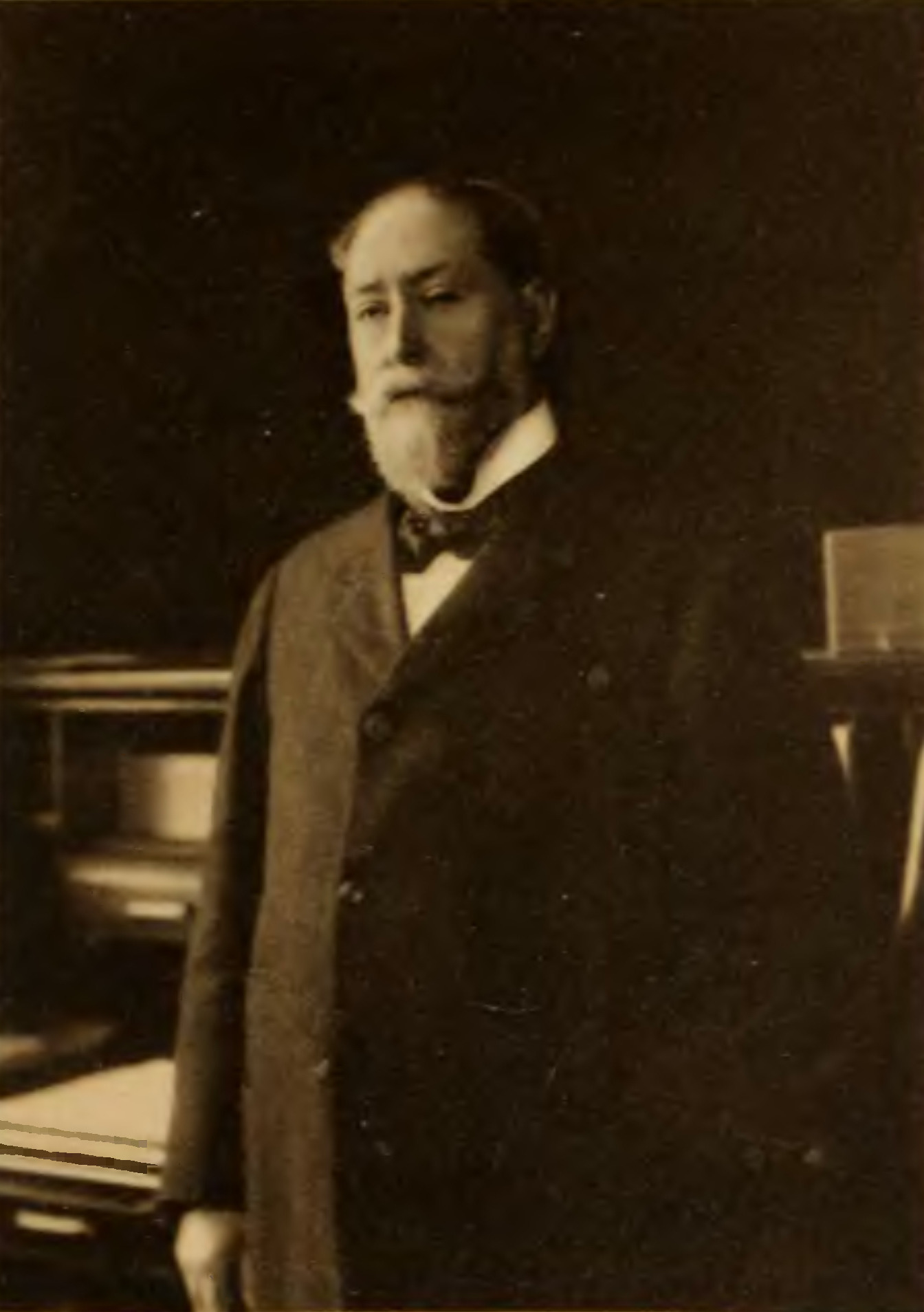 Biografía de Eduardo Wilde, por la casa editorial